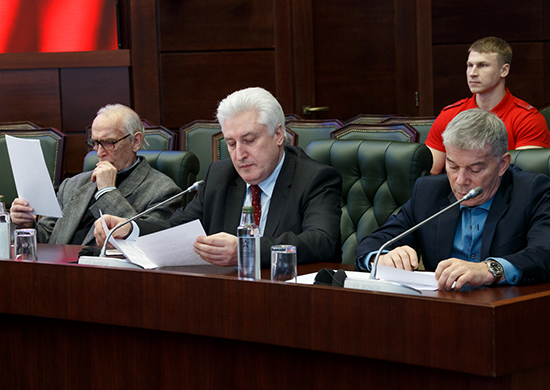 Во время заседания Общественного совета при Министерстве обороны Российской Федерации